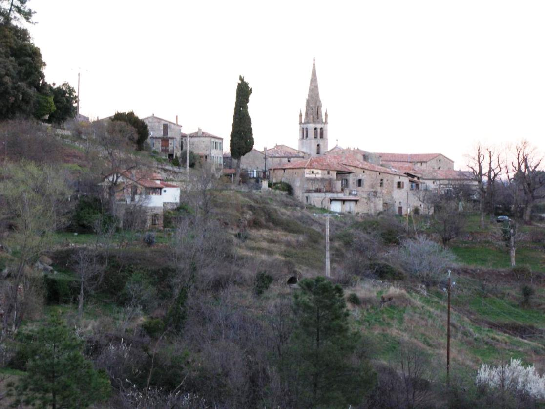 Village de Sanilhac (Ardèche)